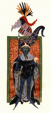 Jošt Lucemburský